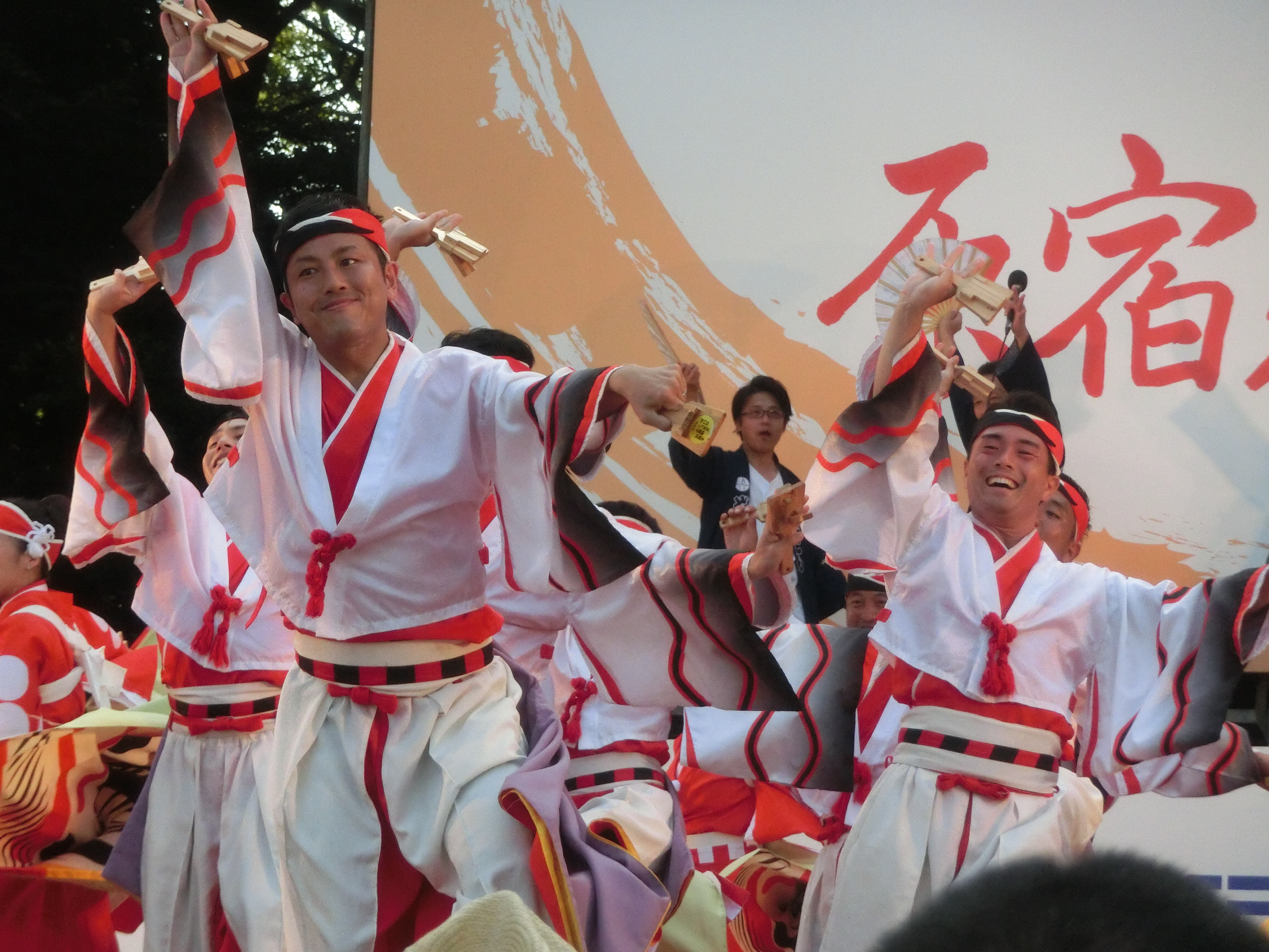 HARAJUKU YOSAKOI